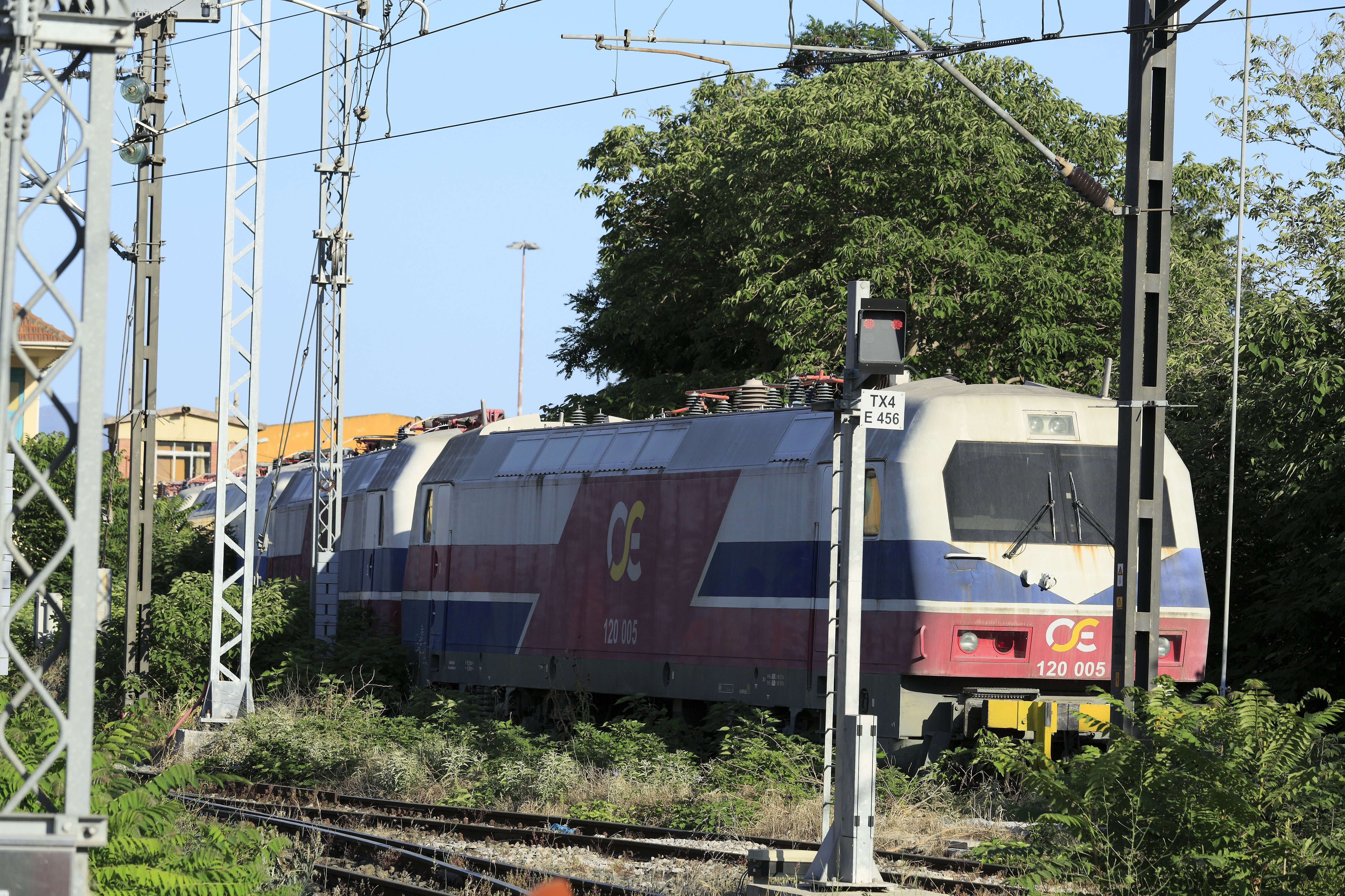 Abgestellt auf der Südseite der Stammgleise. Die hier stehenden Lokomotiven sind seit Jahren abgestellt, möglicherweise waren einige von ihnen nie im Einsatz.